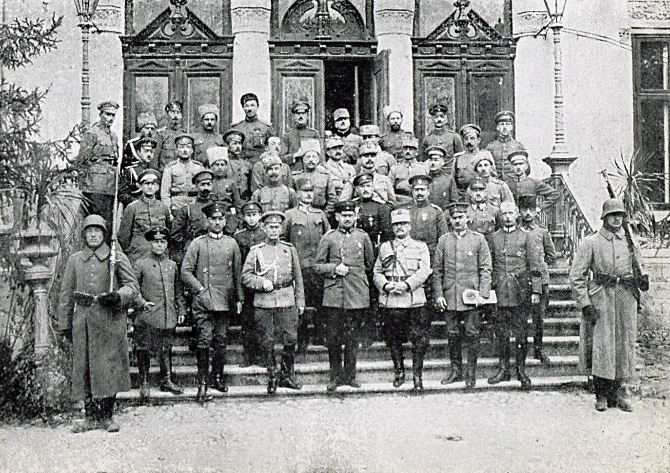 1916 - Album foto - Focsani - armistitiu -delegatiile participante la negocieri